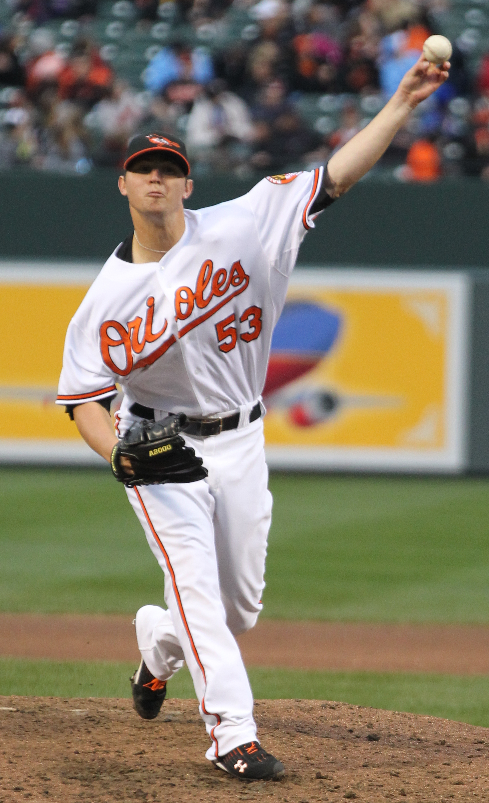 Zach Britton